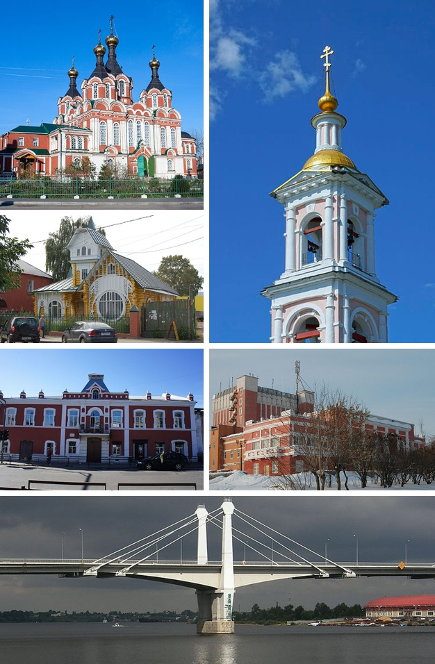 Кимры. Создано на основе следующих изображений